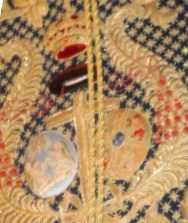 Escudo que aparece en el bacalao de la Hermandad